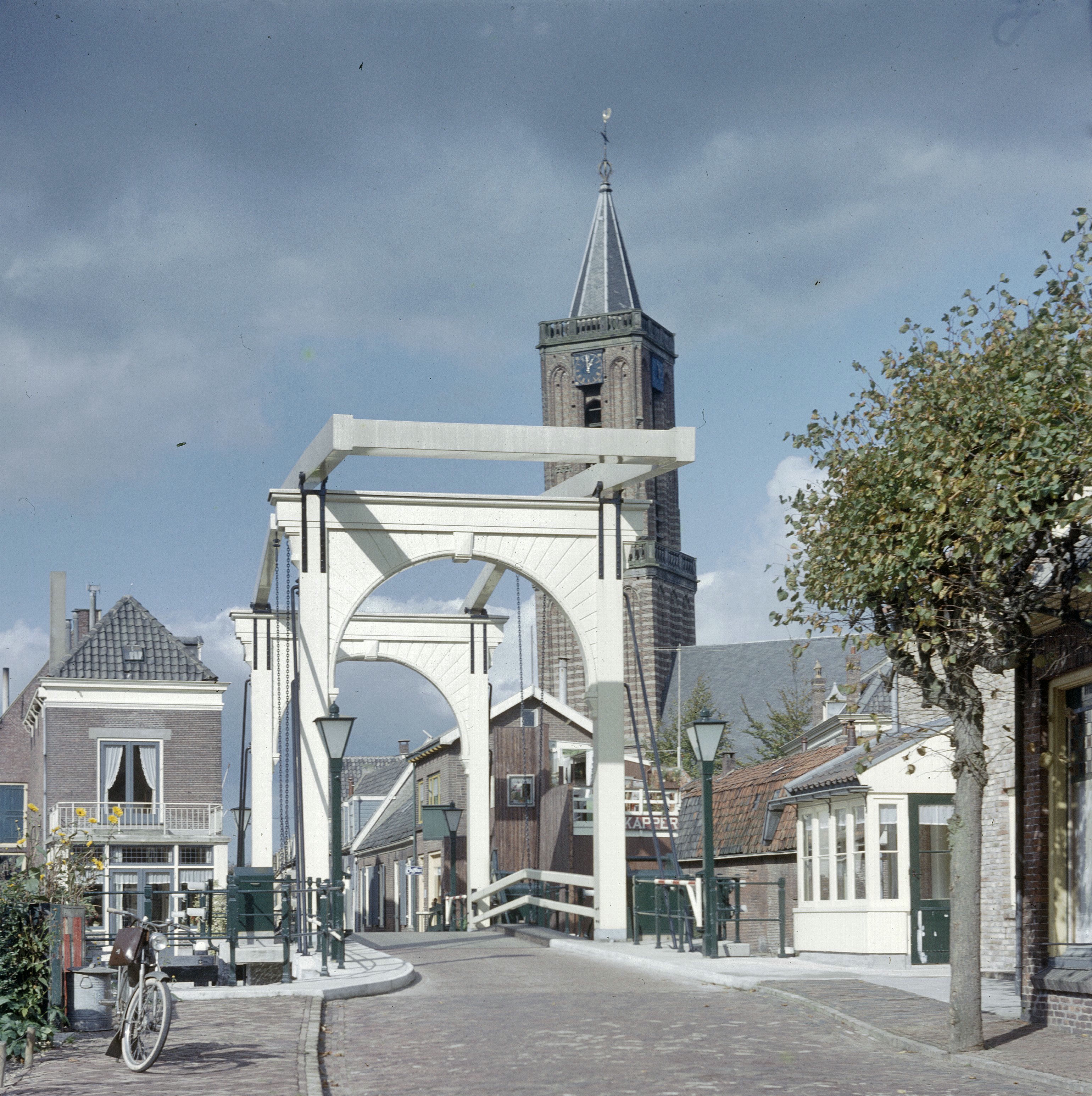 Dorpsgezicht/ Ophaalbrug: Overzicht van de ophaalbrug over de Vecht